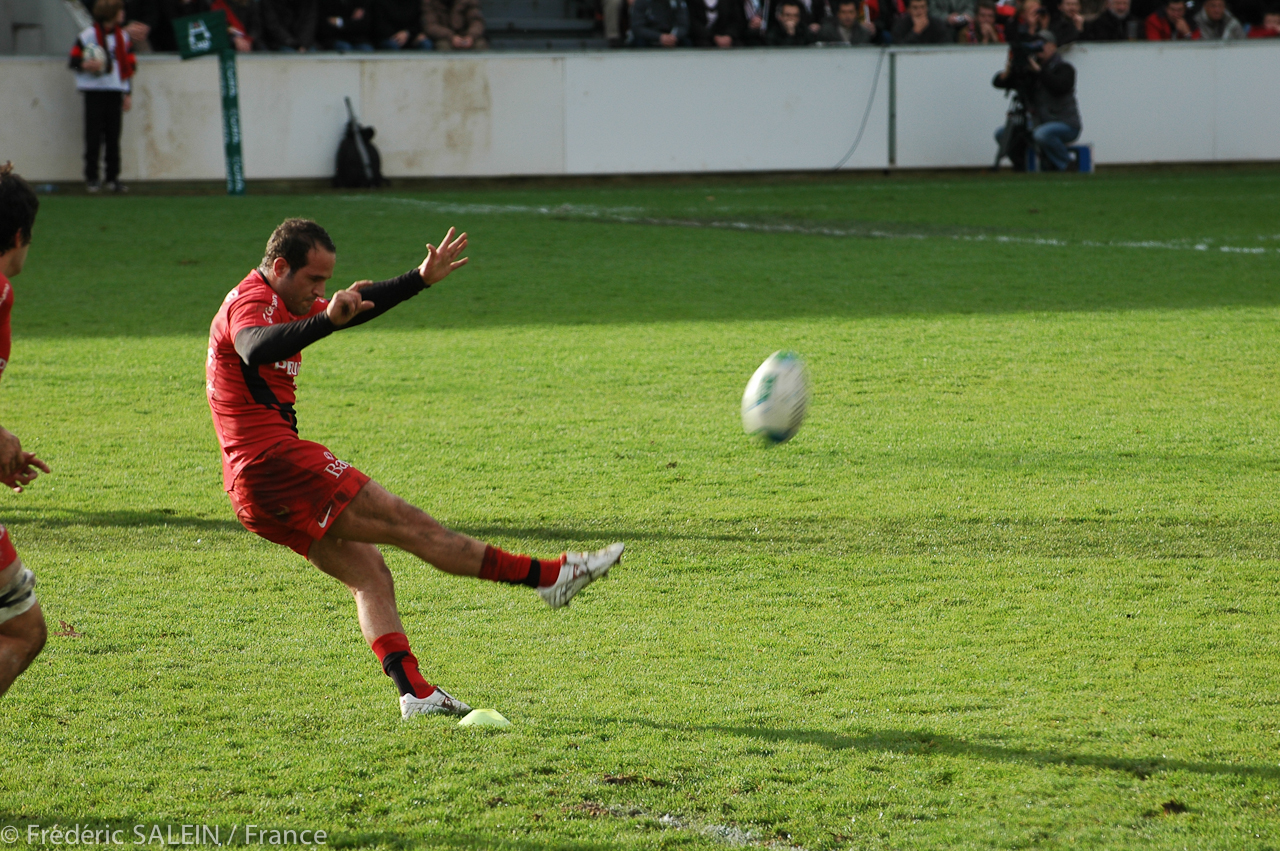 3ème journée de H-cup Le 6 décembre 2008 A Toulouse (Ernest Wallon) Stade Toulousain bat Newport 26 à 7 (mi-temps : 7-0) Spectateurs : 18.700